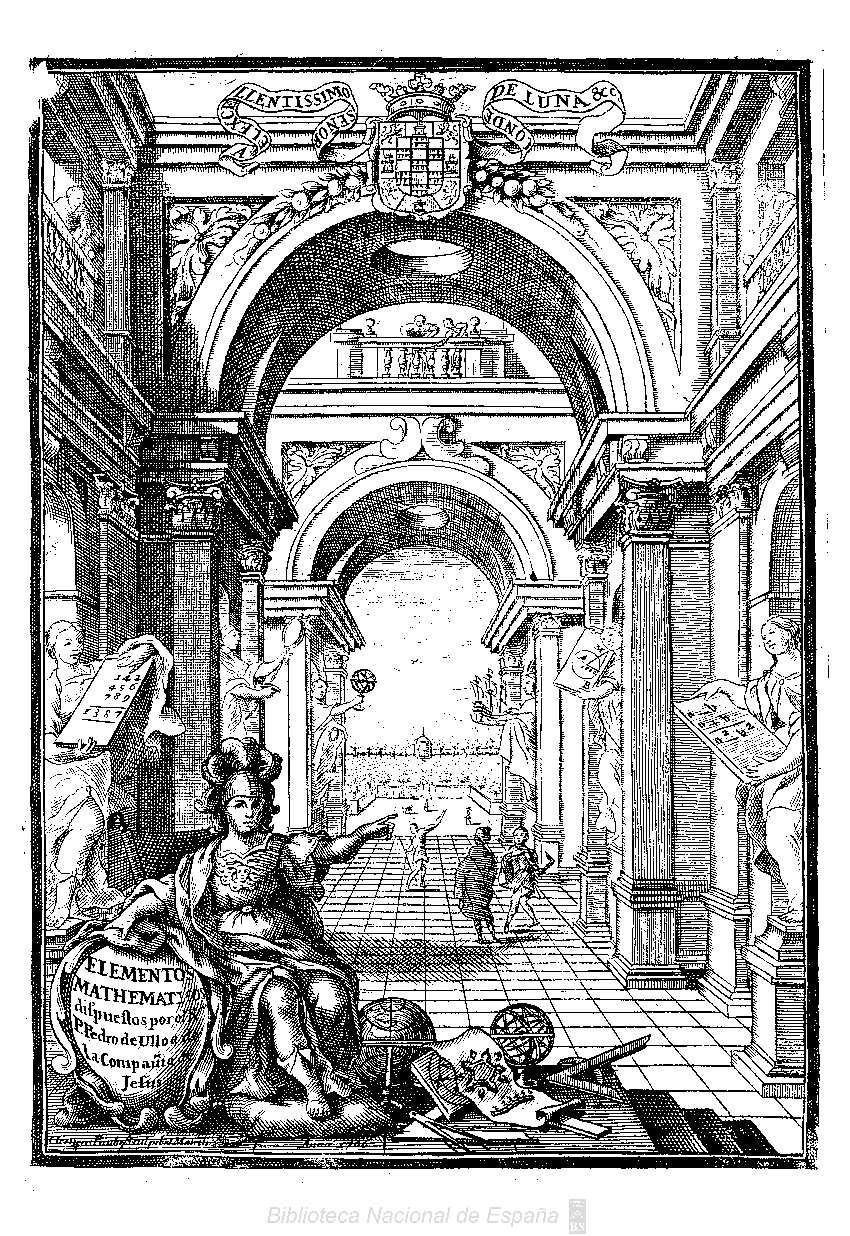 Elementos mathematicos que comprehenden los principios de la arte menor y mayor de la arithmetica, los de los planos y solidos de la geometria, los esphericos de Theodosio ... los principios de la algebra y su aplicación a la geometria :dispuestos y divididos en dos tomos por el padre Pedro de Ulloa, de la Compañia de Jesús ... ; tomo Iº que contiene los principios arithmeticos, los geometricos de planos, y solidos, los de la algebra, los de la trigonometria rectilinia, la tabla logarithmica, y el canon trigonometrico Autor: Ulloa, Pedro de (1663-1721)